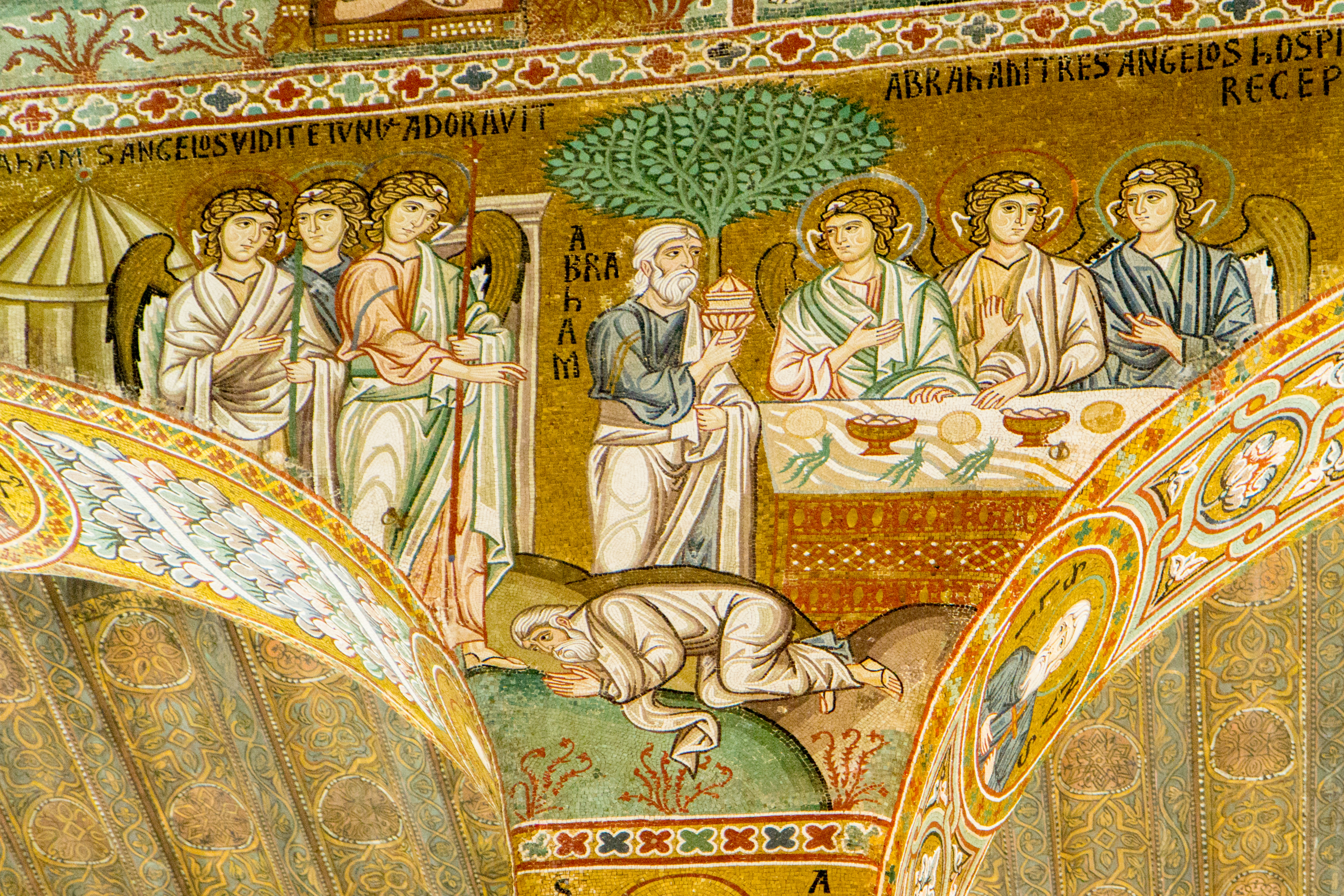 Cappella Palatina